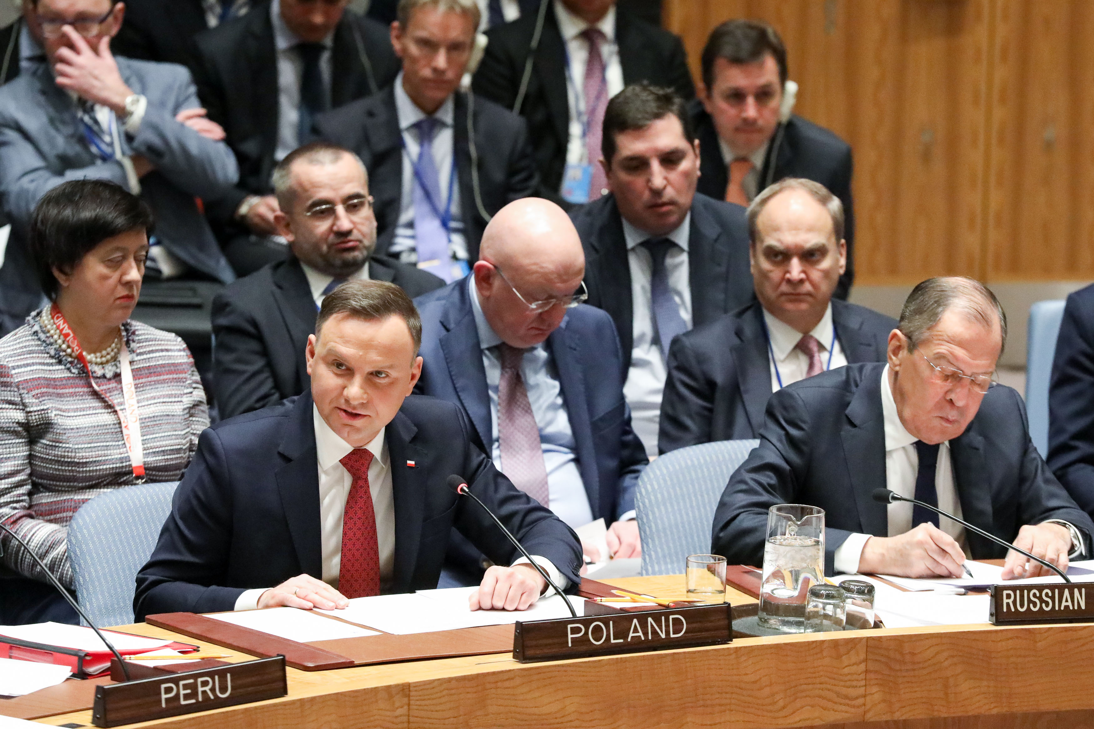 18/01/2018 Wystąpienie Prezydenta RP podczas posiedzenia Rady Bezpieczeństwa ONZ w Nowym Jorku. Fot. Jakub Szymczuk